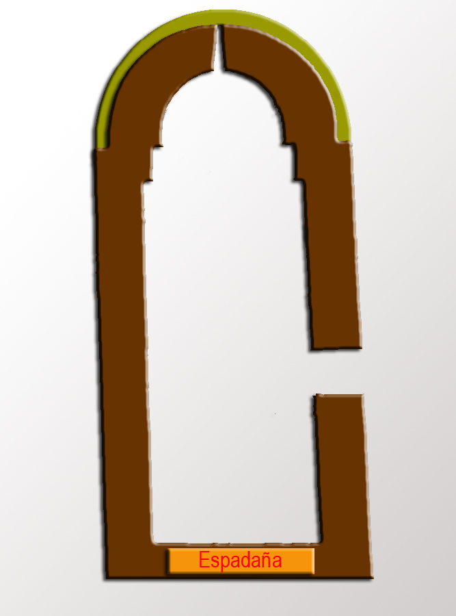 Planta de Ermita de Sant Quirc de Durro, se encuentra en la localidad de Durro dentro del valle de Boí. Cataluña autor papix realzada con adobe photoshop